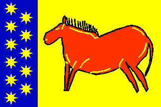 Bandera de Candamo, en Asturias (España)